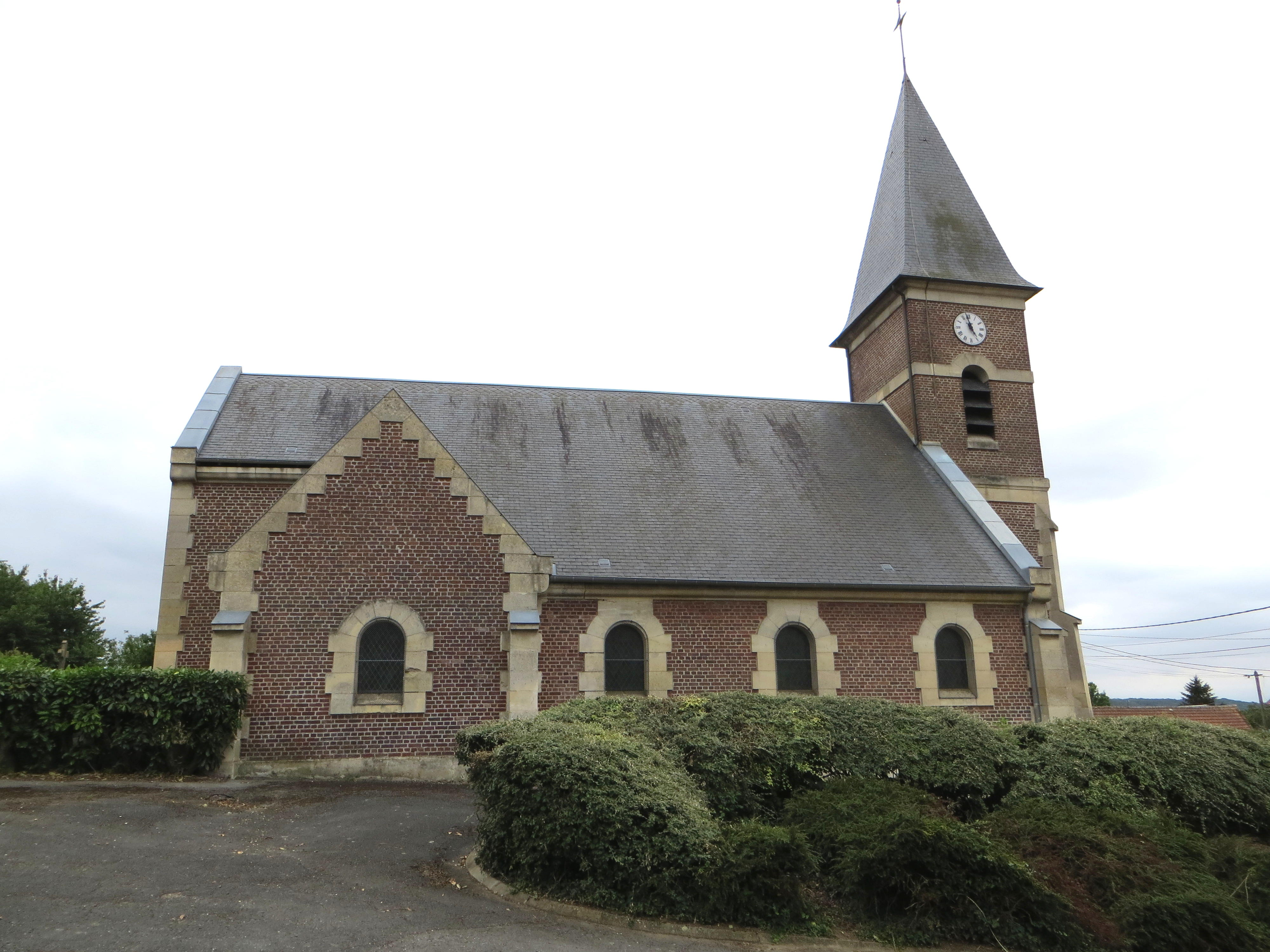 Vue générale de l'église